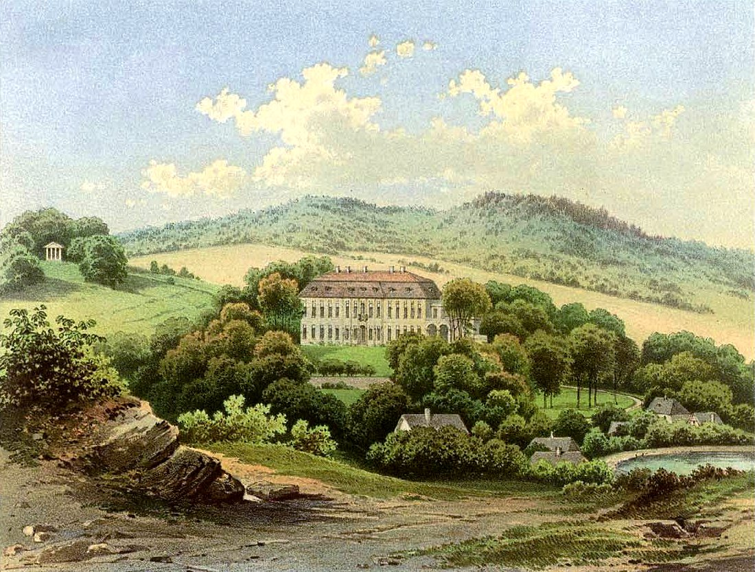 Schloss Tiefhartmannsdorf, Lithografie aus dem 19. Jahrhundert